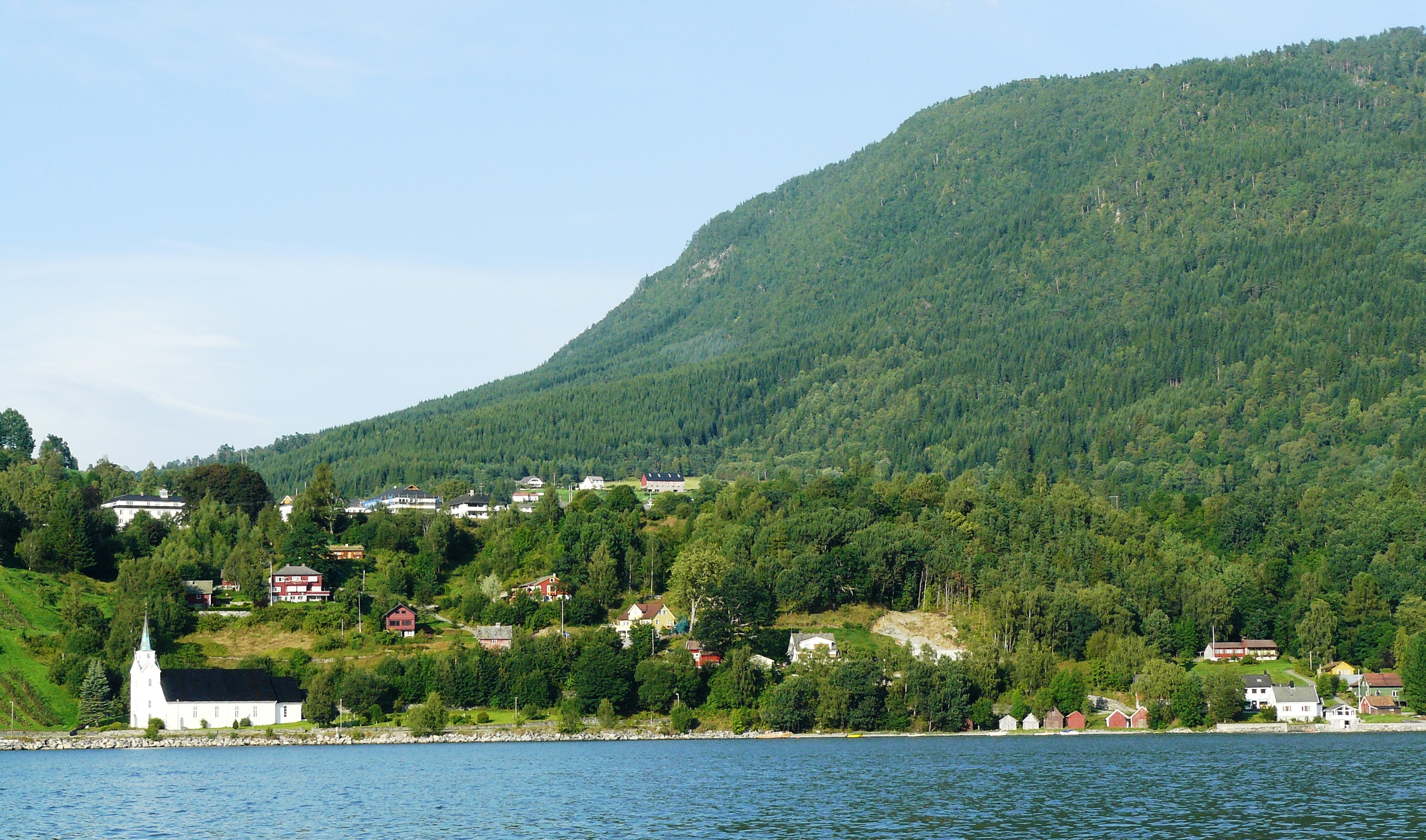 Vereide, Gloppen, Norway - fjordview